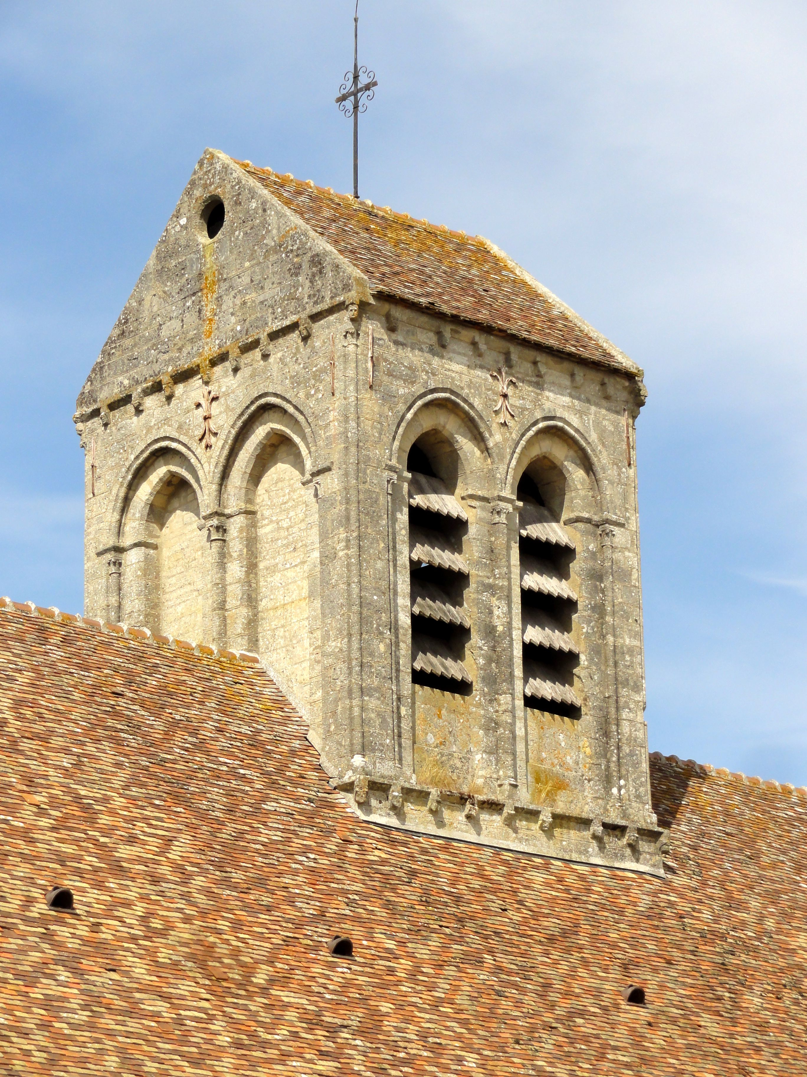 Clocher gothique sur la croisée du transept.